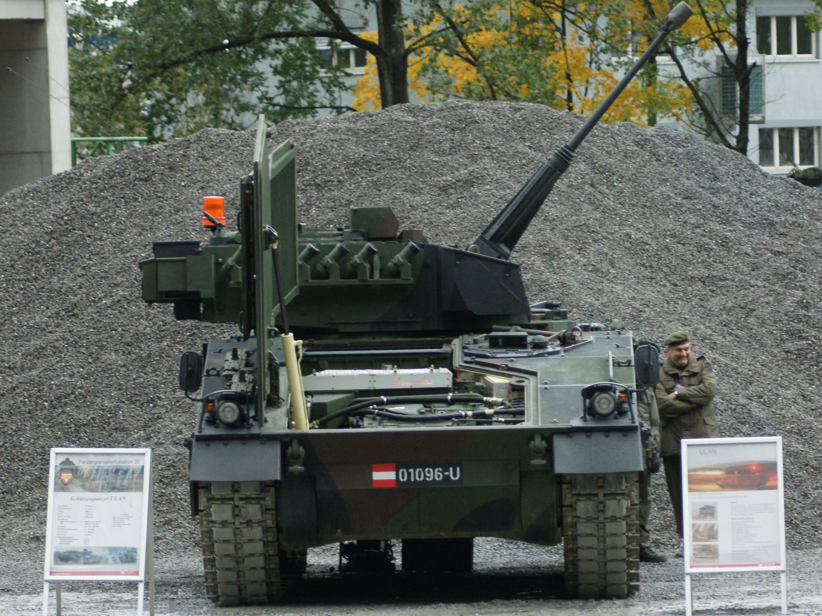 Im Zuge einer Road-Show zeigte das Österreichische Bundesheer im Dornbirner / Hohenemser Steinbruch den Ascod (Austrian-Spanish Co-operative Development), der Name eines Panzerfahrzeugs, das in einer Österreichisch-Spanischen Co-Produktion gefertigt wird. Der Schützenpanzer Ulan wird von der österreichischen Steyr-Daimler-Puch Spezialfahrzeug GmbH und der Pizarro von der spanischen Santa Bárbara Sistemas gefertigt.